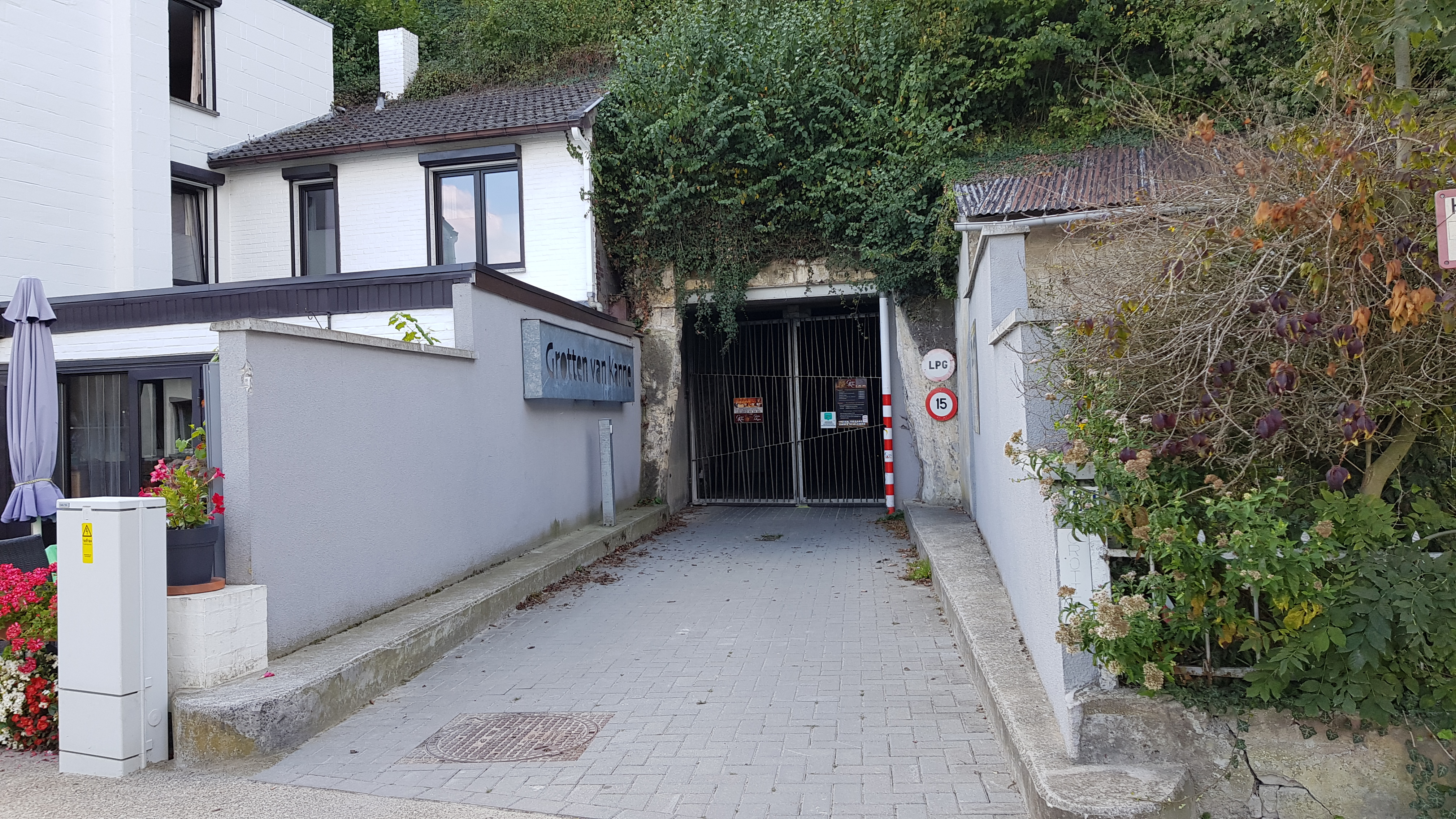 Mergelgroeve van Kanne, Kanne, Riemst, België